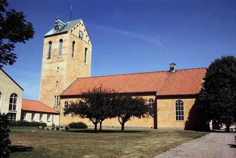 Höganes kyrka i Skåne, Sverige. Höganäs Himmelfartskirke